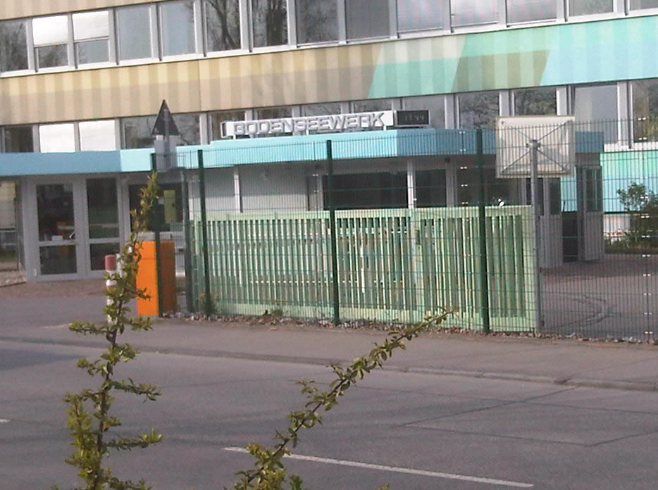 Hauptpforte der Bodenseewerke